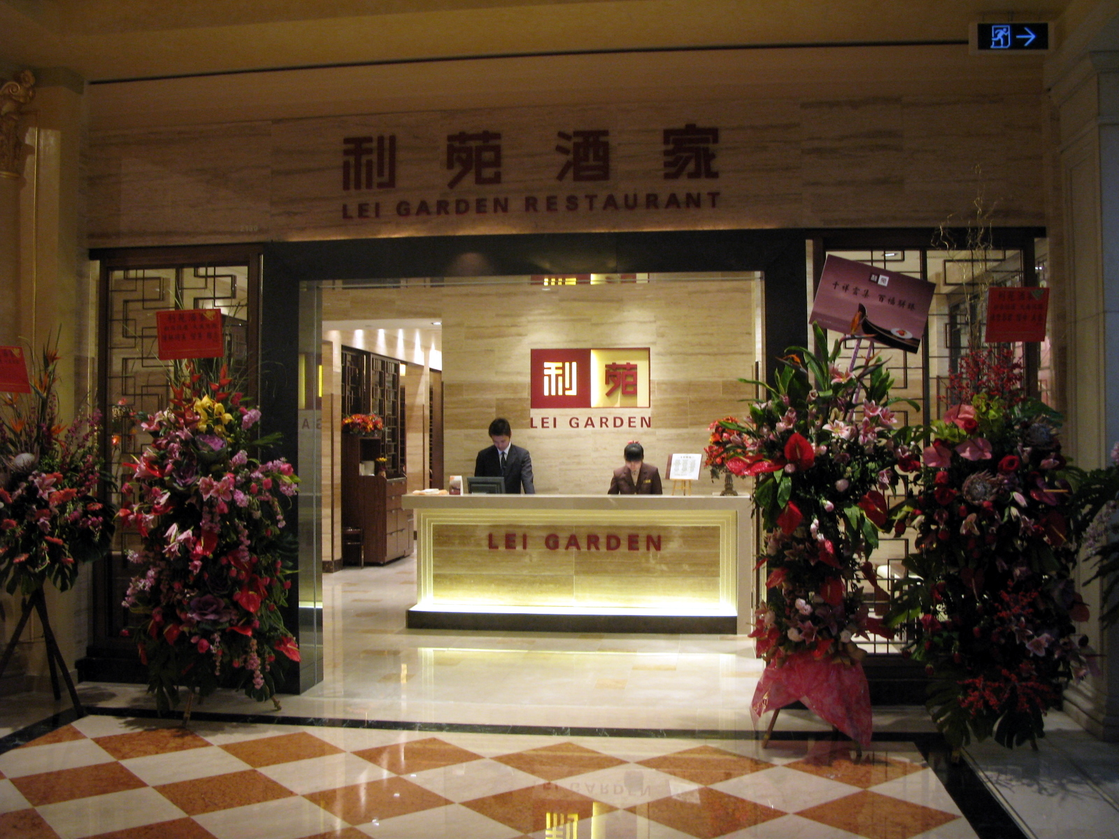 Lee Garden Restaurant in The Venetian Macao